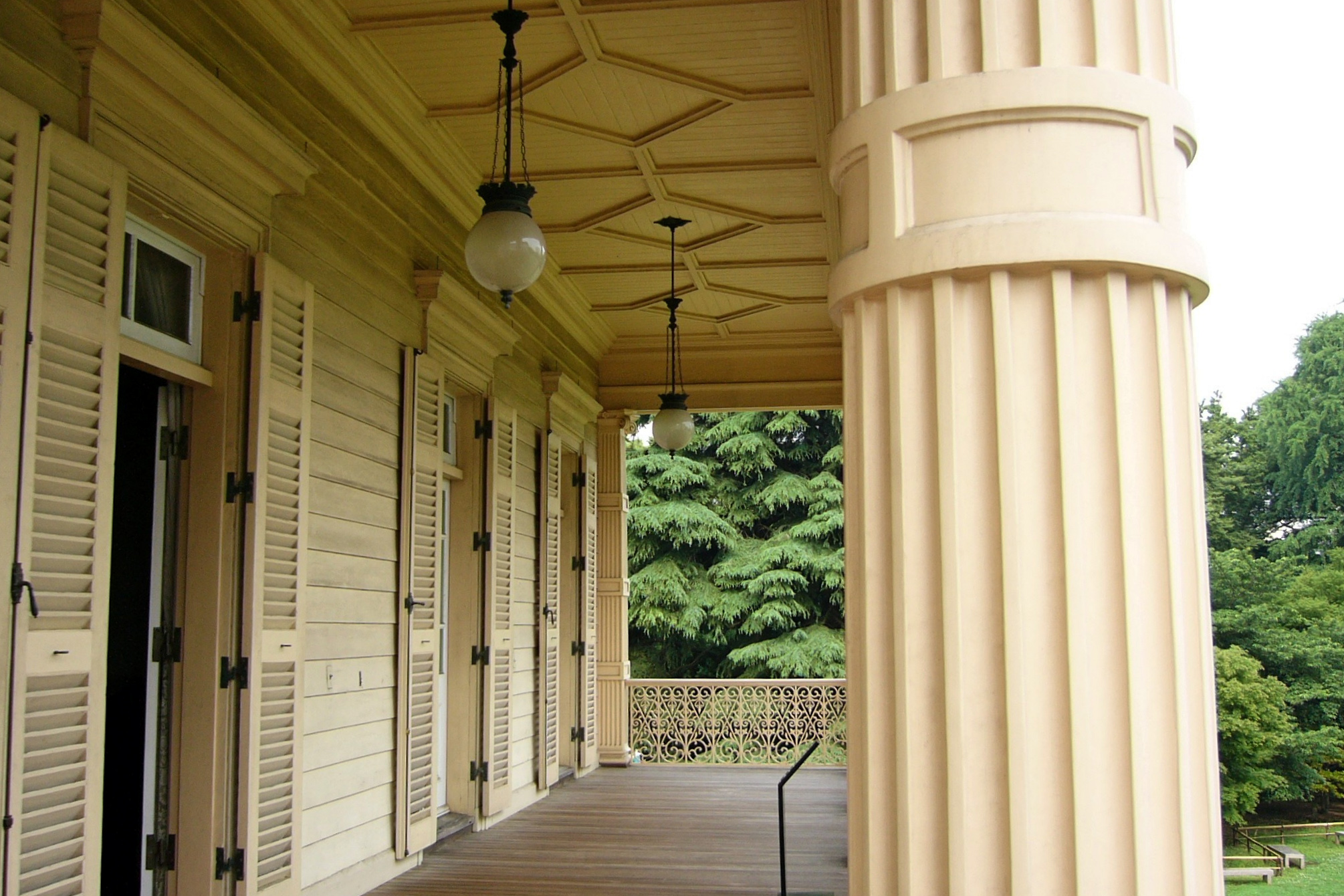 Old Iwasaki House in Taito-ku, Tokyo, Japan